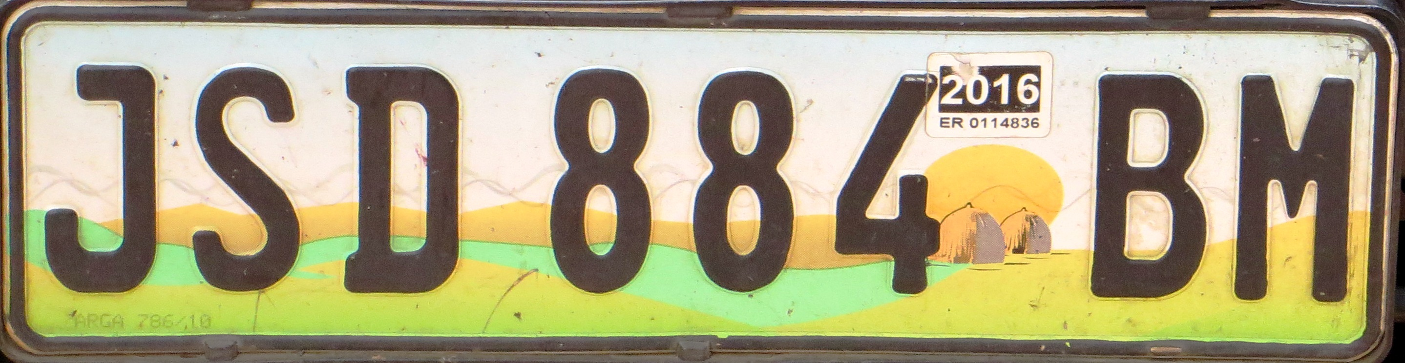 Swaziland kentekenplaat